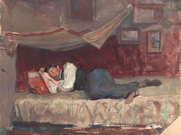 Работа Якова Соломоновича Хаста "В мансарде". Спящий мужчина - друг художника, Клод Моне.